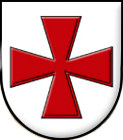 Znak obce Bernartice, okres Jeseník.